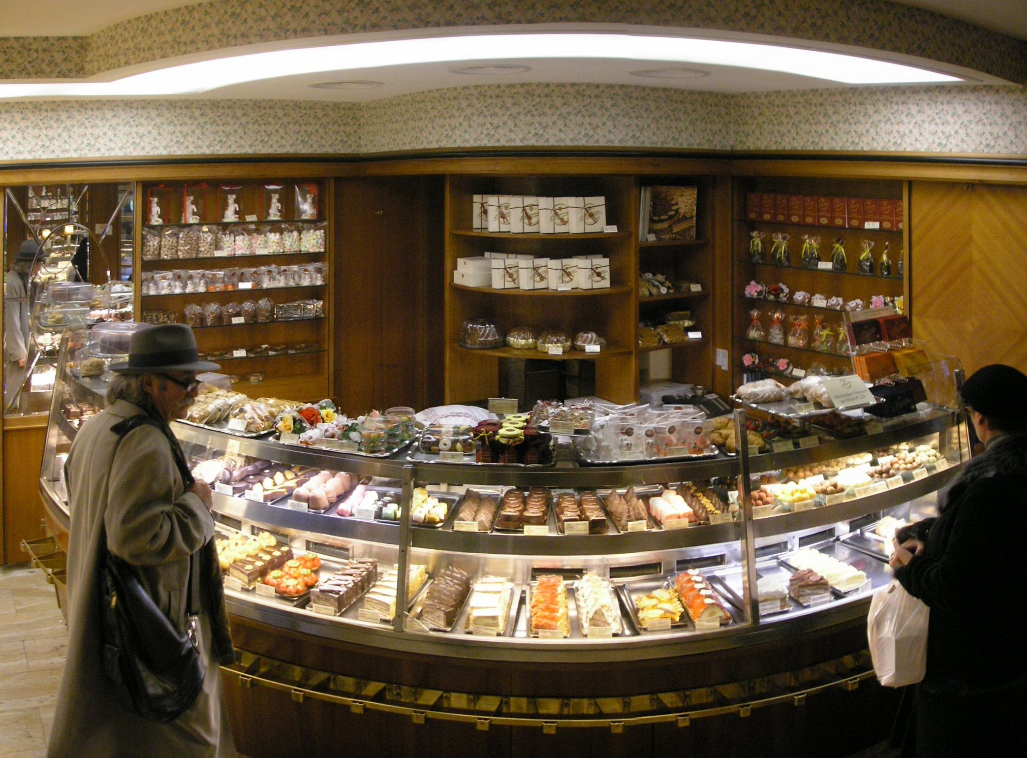 The L. Heiner cafe at Wollzeile in Vienna.